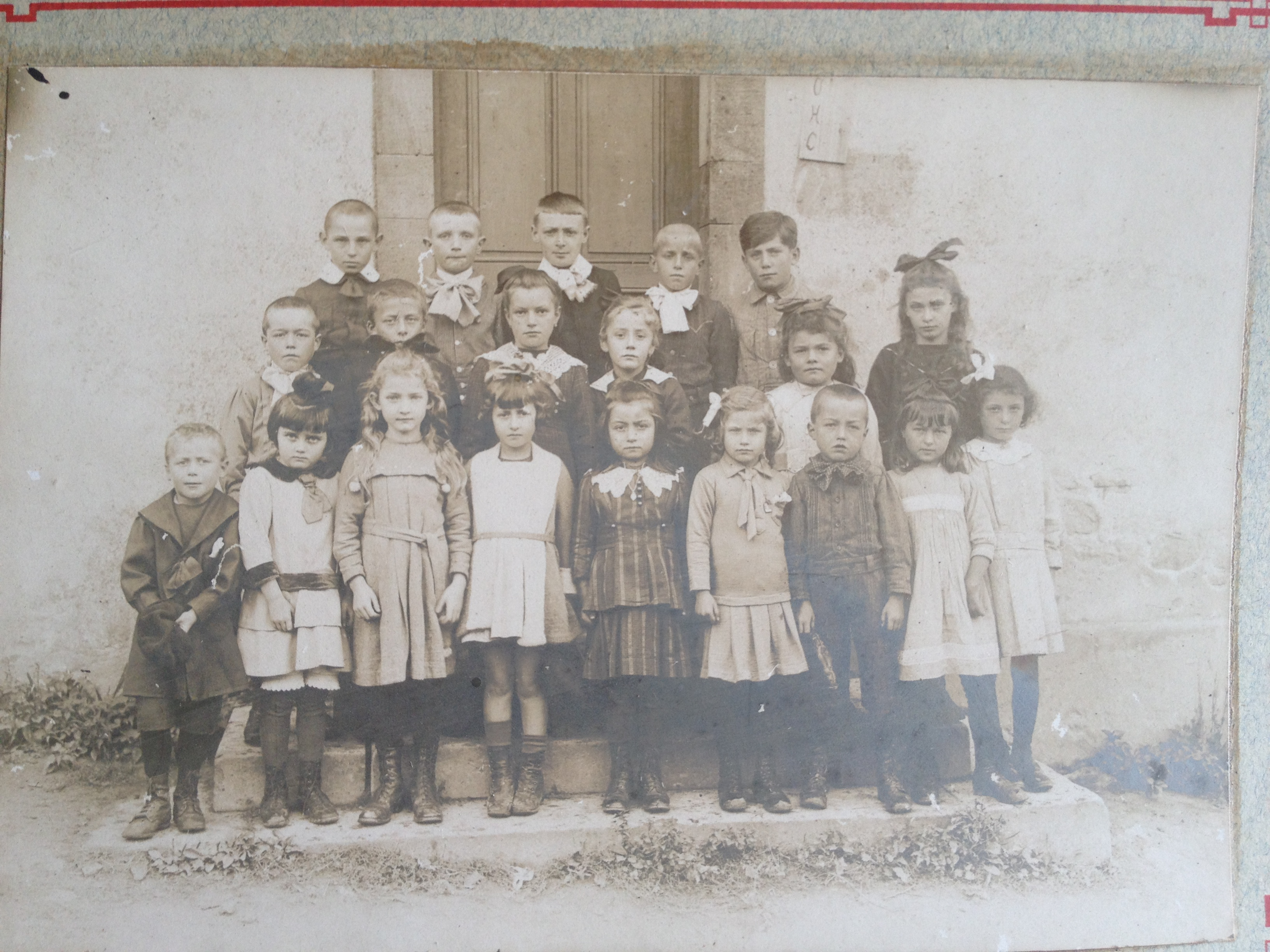 Elèves devant l'école de Girovillers sous Montfort (Domjulien) date estimée 1920